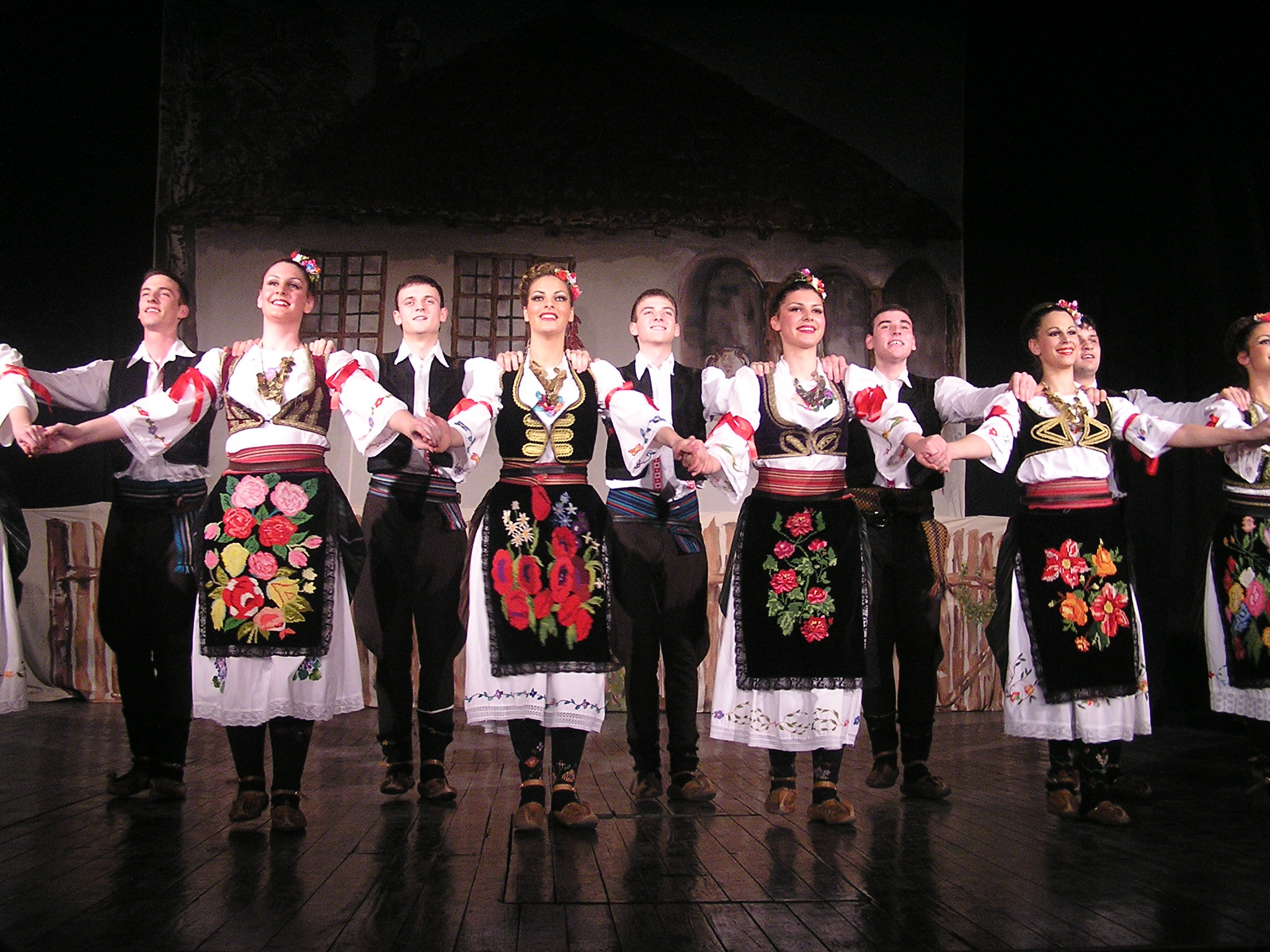 Godišnji koncert 24. decembar 2005./ Nova Pazova